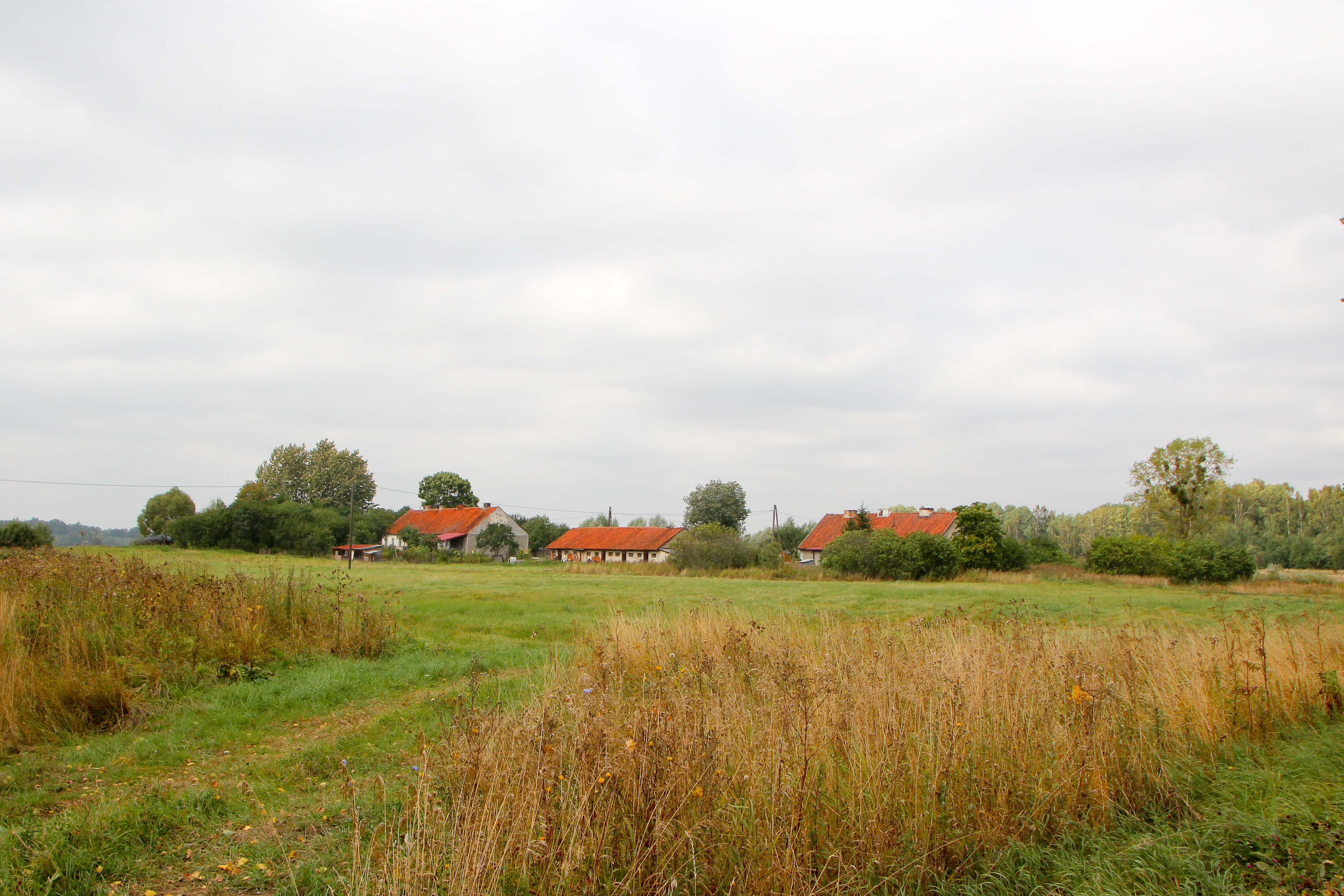 Rutka - wieś w Polsce położona w województwie warmińsko-mazurskim, w powiecie kętrzyńskim, w gminie Barciany.